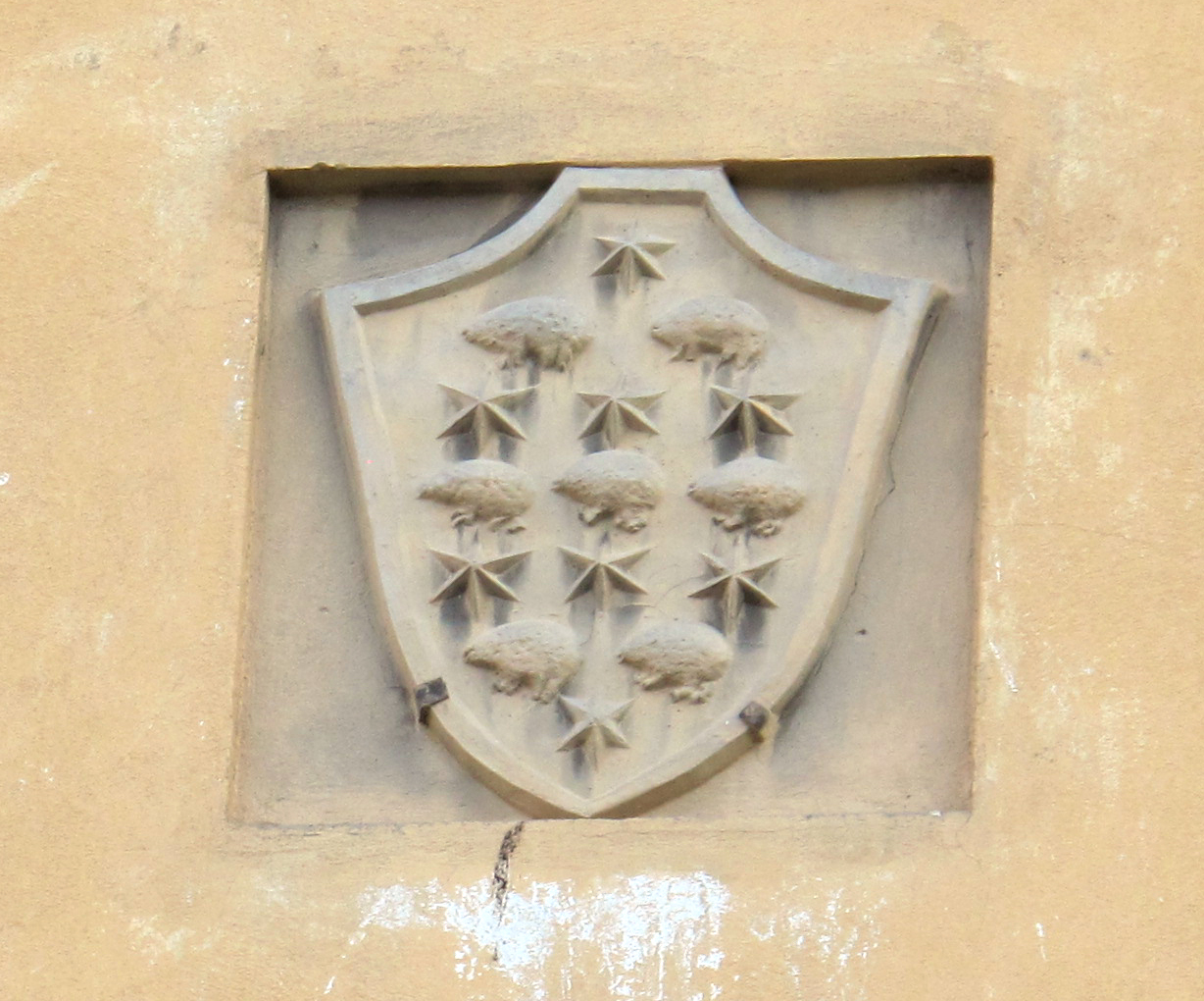 Palazzo Bartolini Baldelli su piazza santa croce, stemma ricci di santa croce